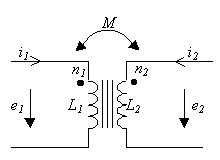 dessin perso pour circuits couplés P.Loos